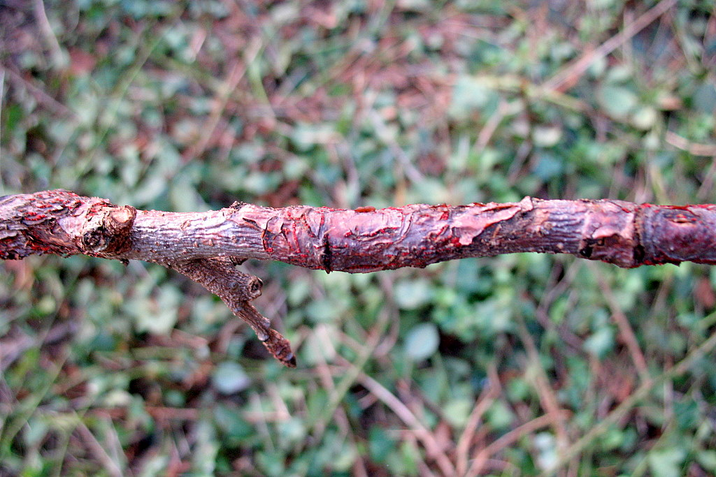 Nectria galligena (= Neonectria ditissima) sur pommiers - Points rouges